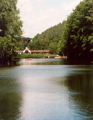 Eiswoog im Pfälzerwald